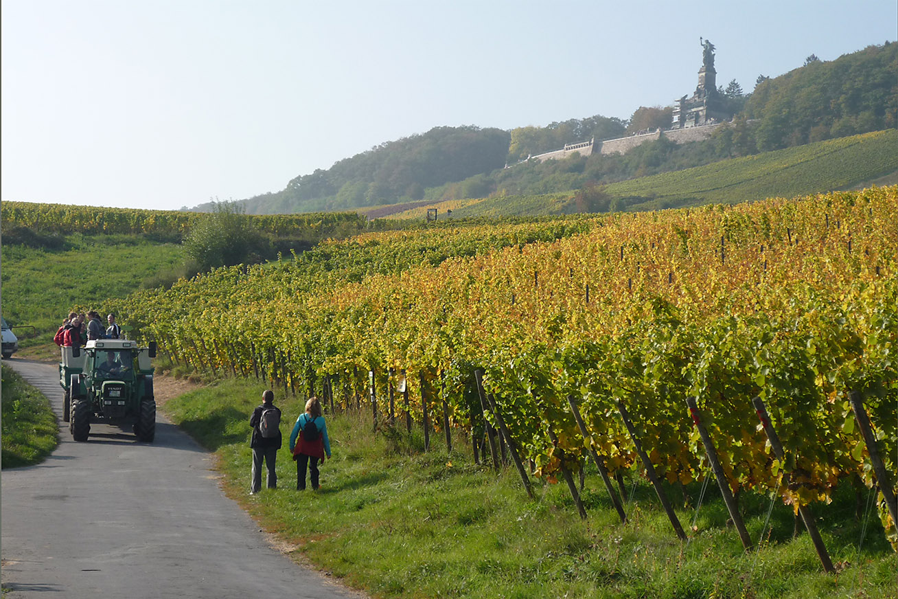 Weinlese am Historienweg auf dem Weg nach Assmannshausen, unterhalb des Niederwalddenkmals in Rüdesheim am Rhein(P1050509-3x2u4)